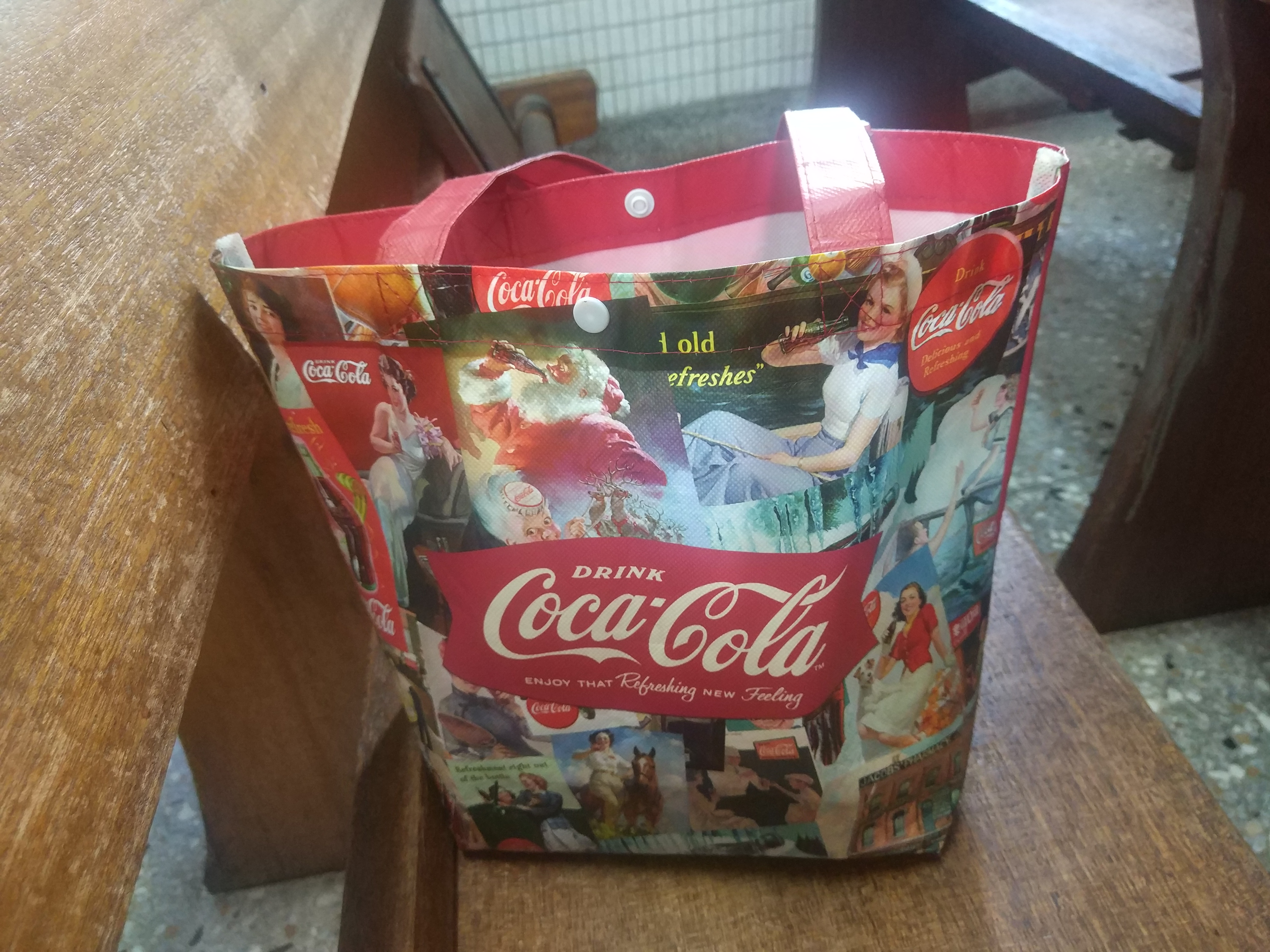 中文（台灣）: 可口可樂購物袋